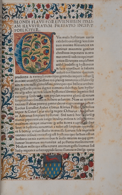 Blondus Flavius, Italia illustrata (1474) first page